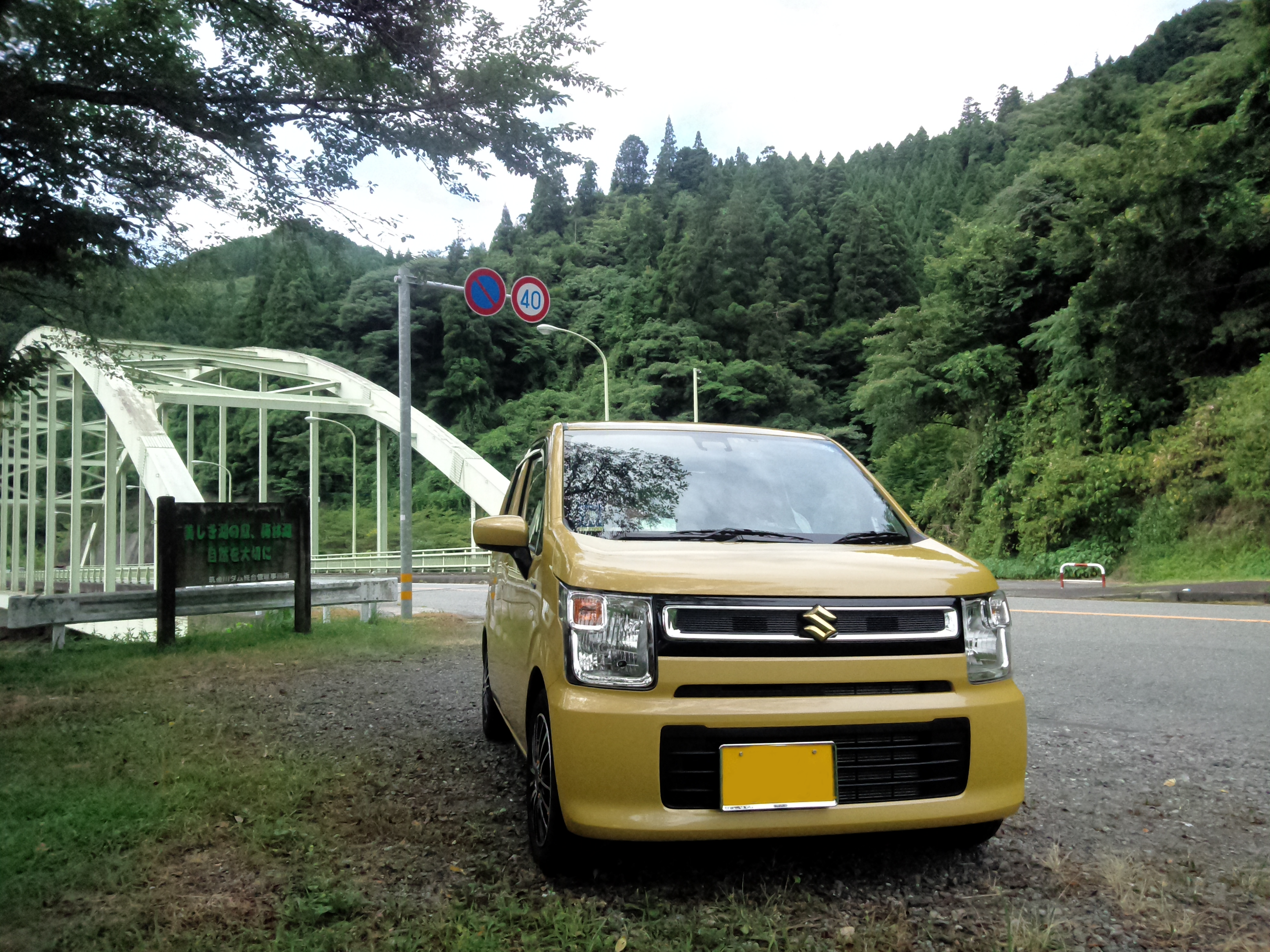 6代目ワゴンR HYBRID FX（広瀬すず出演のCMに登場したサニーイエローメタリック）、大分県日田市大山町松原ダム湖畔にて撮影